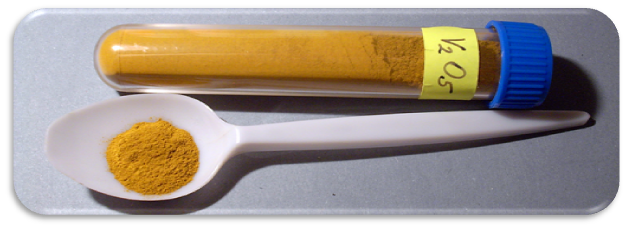 Oxid vanadičný - V2O5